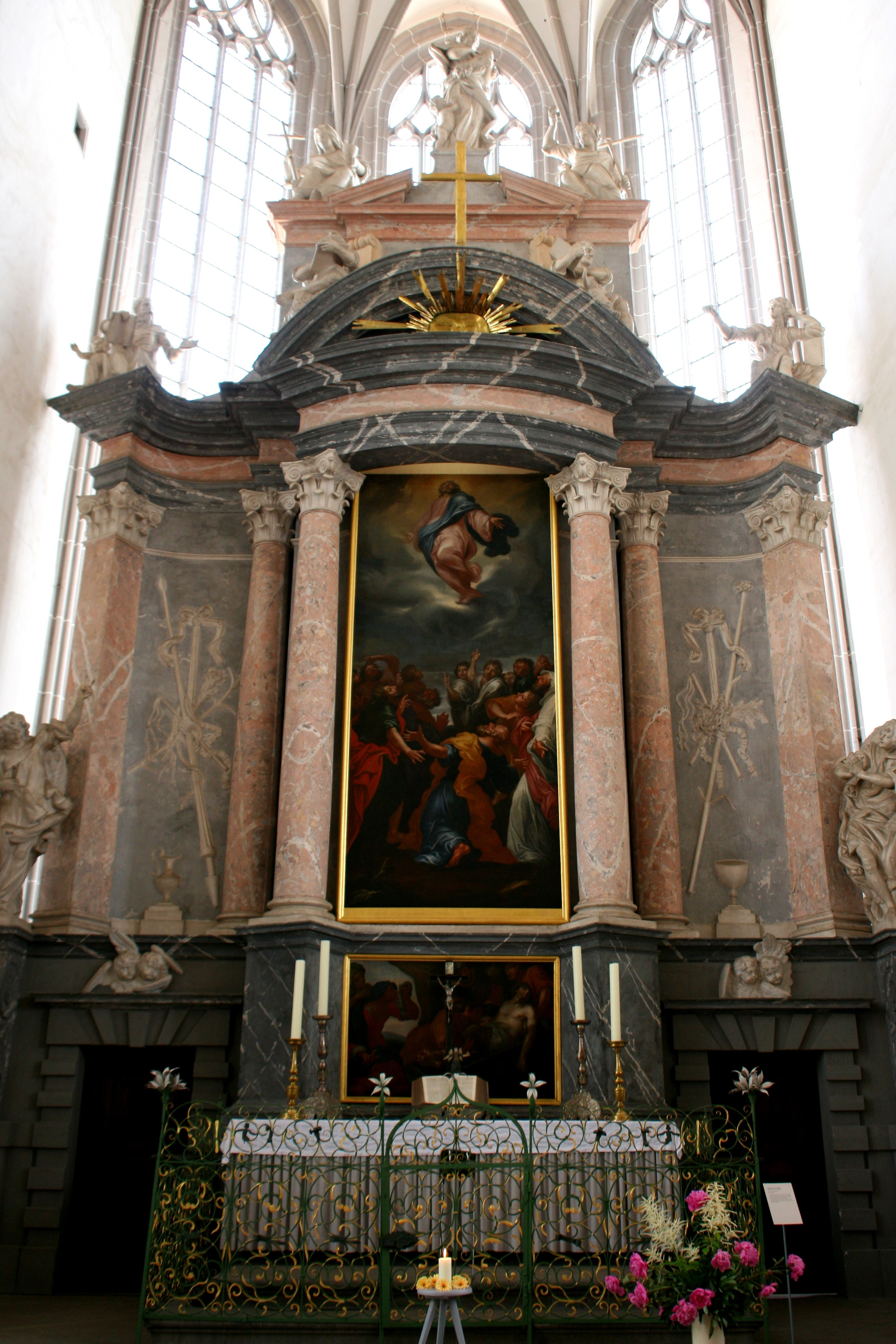 St. Peter und Paul, Bei der Peterskirche in Görlitz